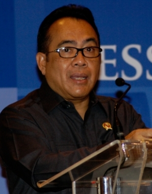 Paskah Suzetta pada Sosialisasi PLTA Cisokan